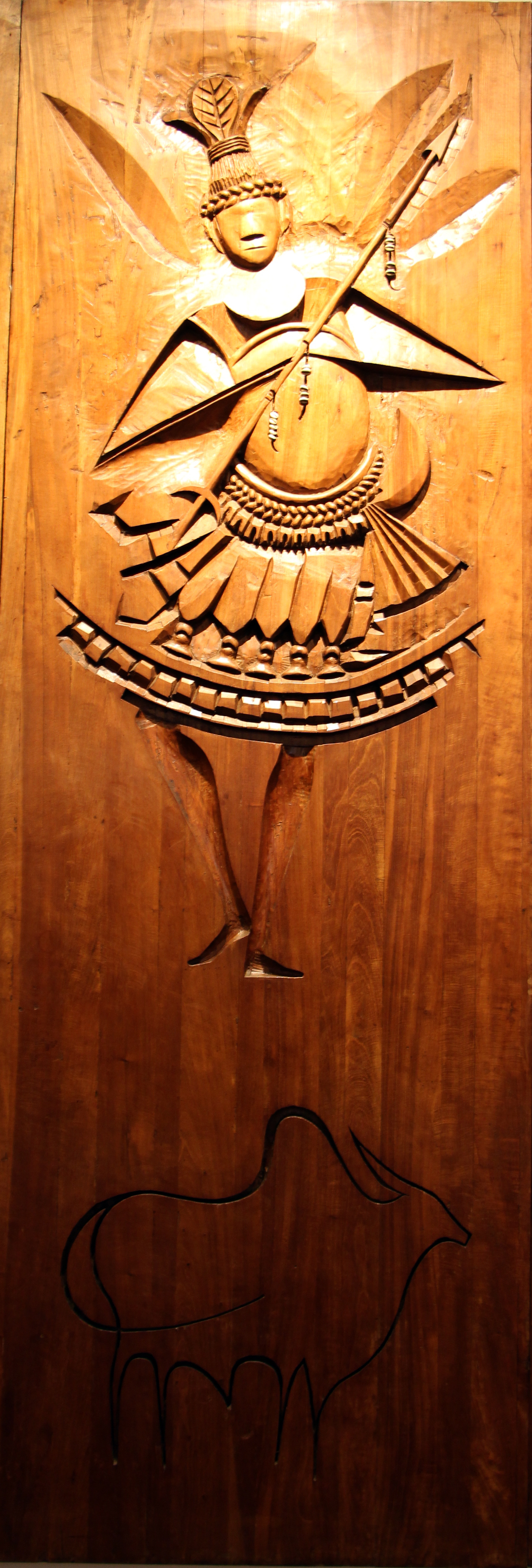 Candomblé nel Museu Afro-Brasileiro, Salvador